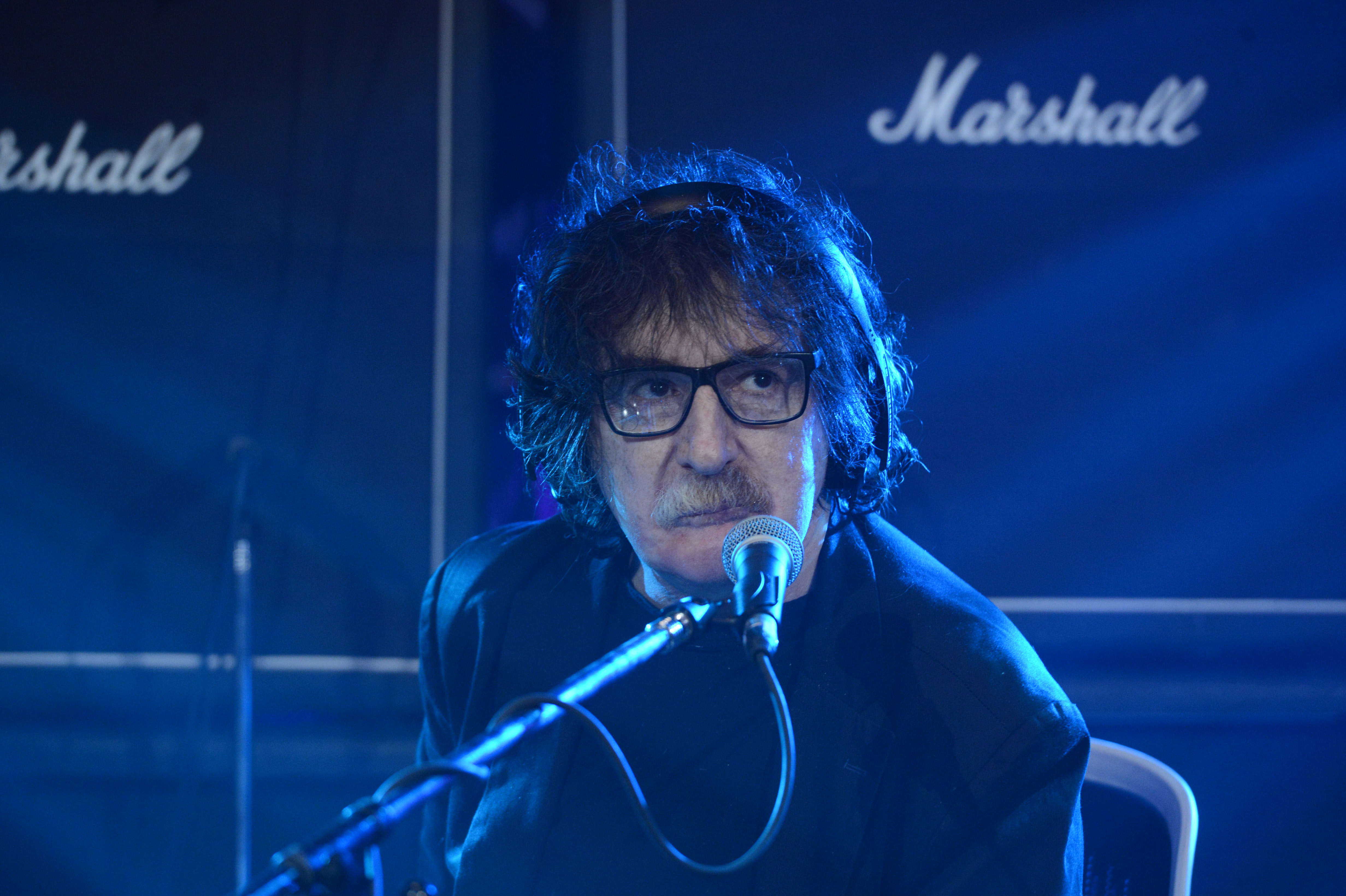 Charly García. Homenaje Gustavo Cerati. 04.11.2014. Foto TVP 2014